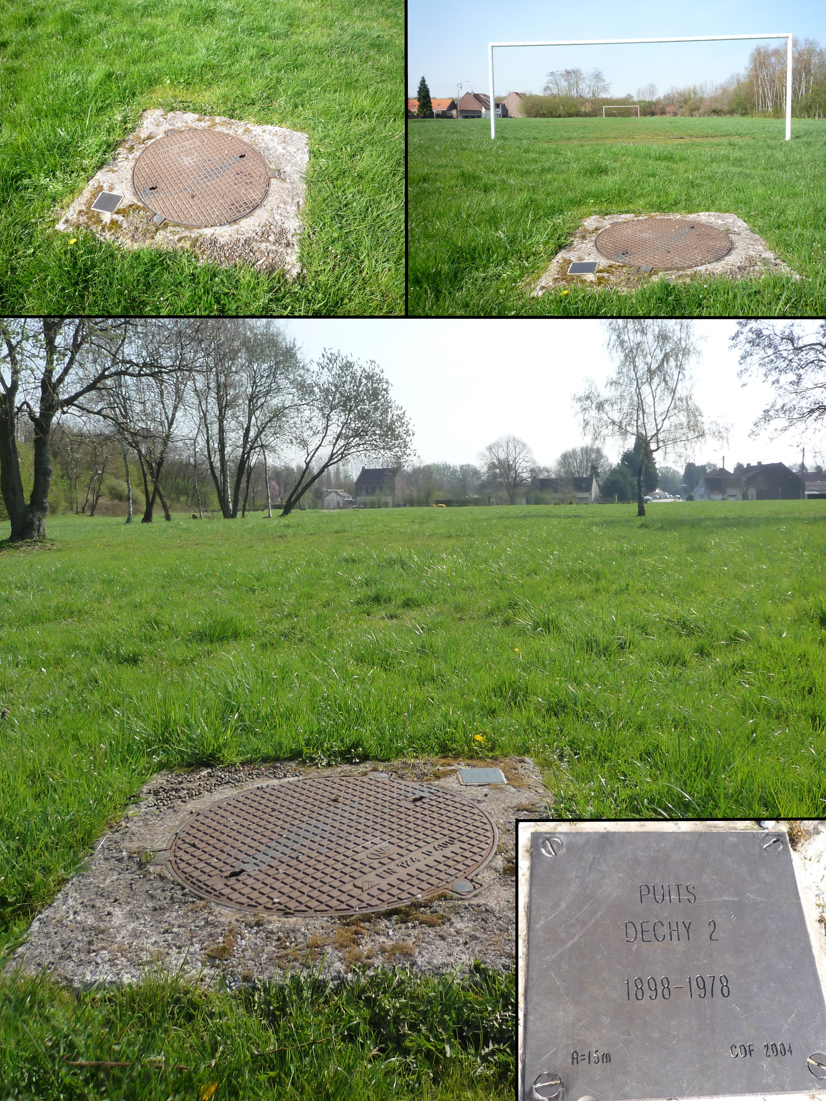 La Fosse Dechy de la Compagnie des mines d'Aniche était un charbonnage constitué de deux puits situé à Dechy, Nord, Nord-Pas-de-Calais, France.